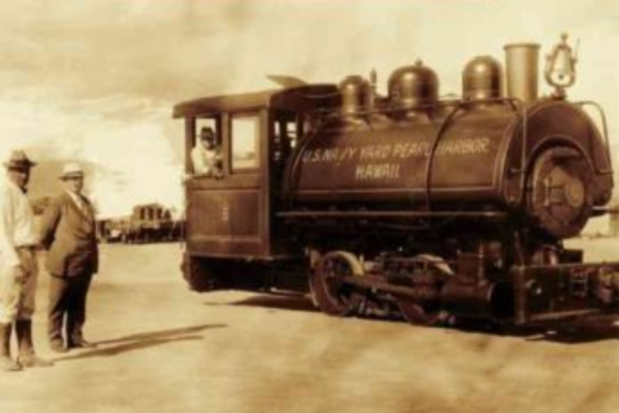 Autor Jeff Livingston Verlagsinformation Verlag Arcadia Pub (sc) Veröffentlichung 2014 Zusätzliche Information Format Taschenbuch Sprachausgabe Englisch Seiten 127 Seiten Gewicht 317 g EAN 9781467131971 ISBN 1467131970